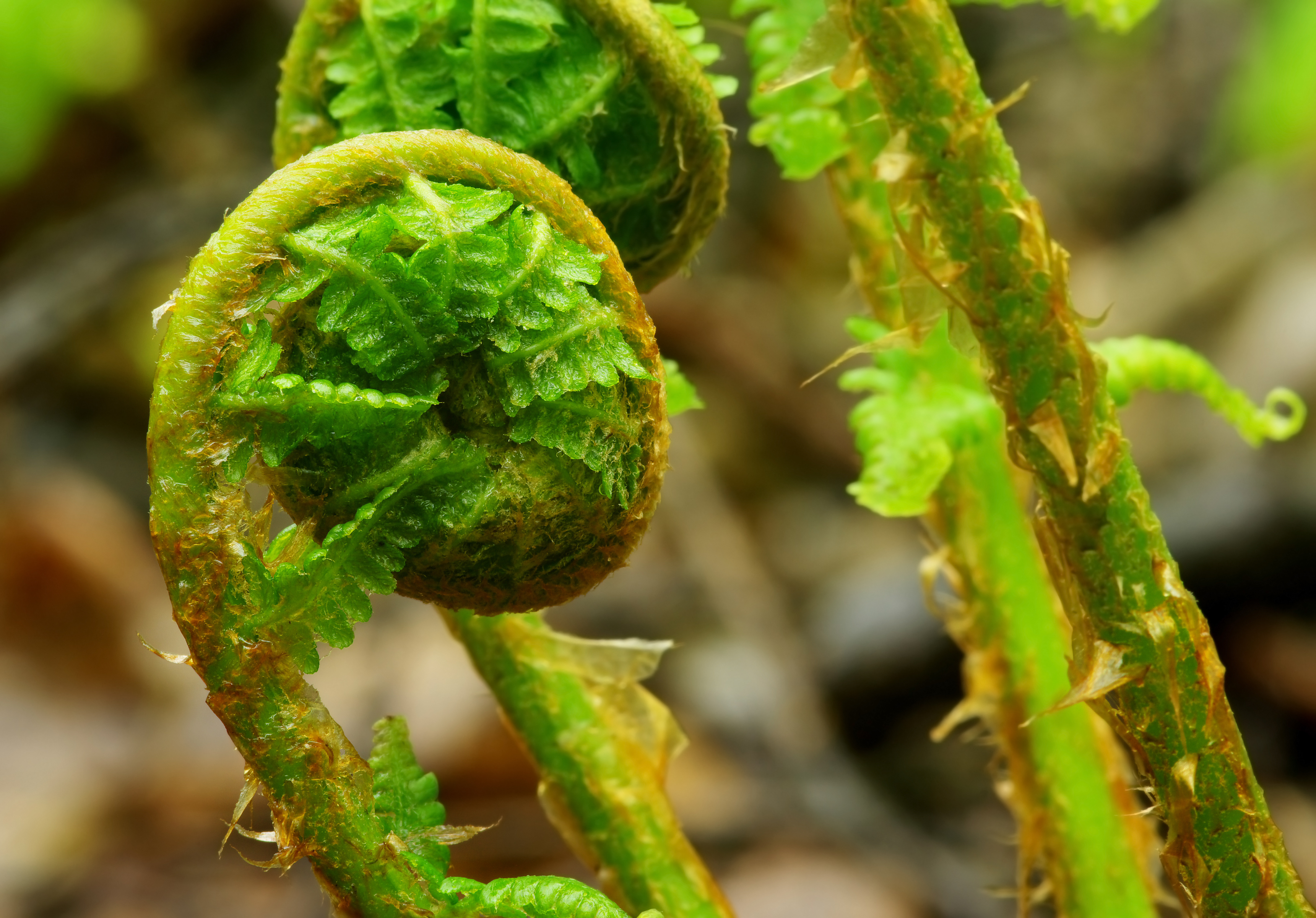 Nerecznica samcza (Dryopteris filix-mas (L.) Schott)